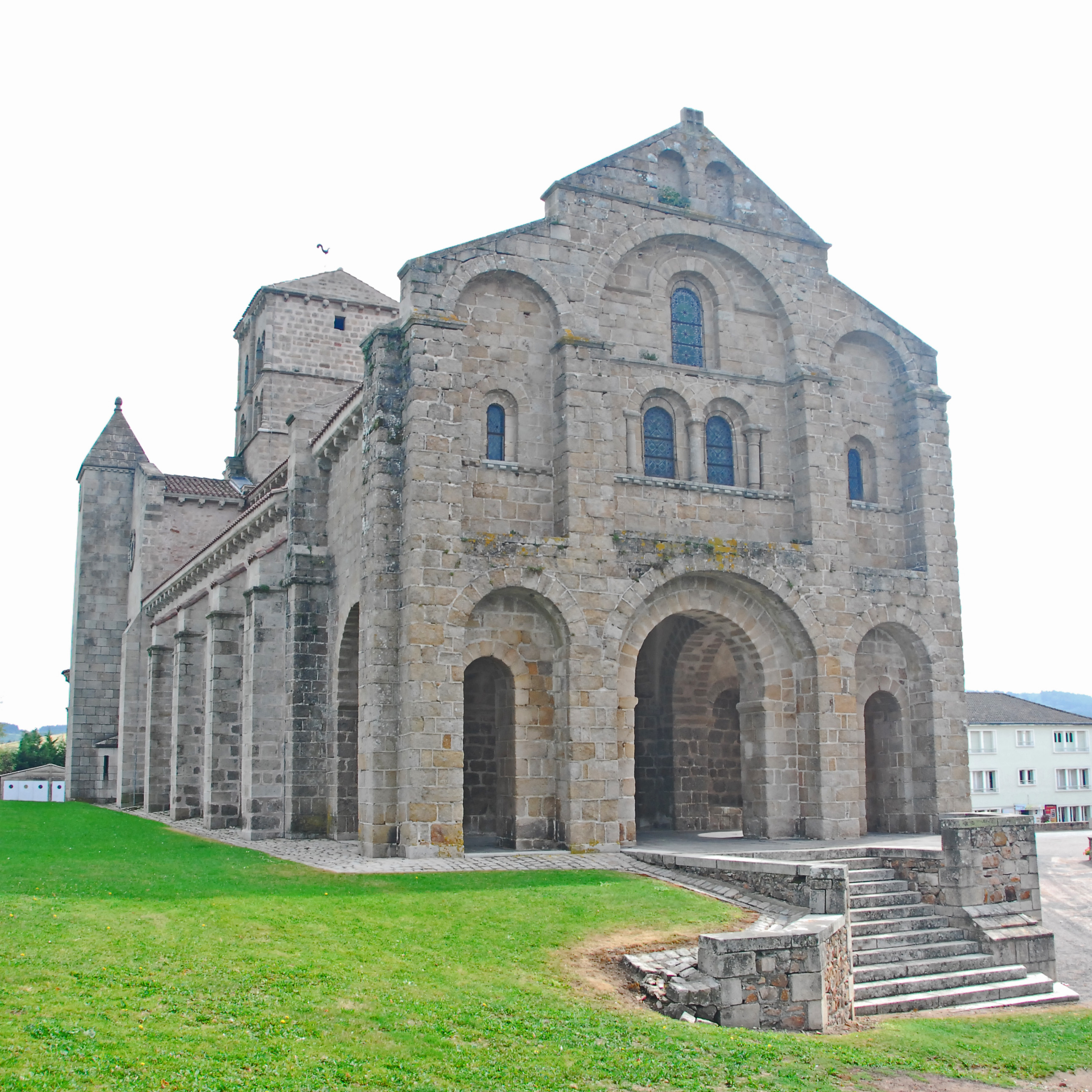 N.-D. de Châtel-Montagne, Portalvorbau, Fassade von NW